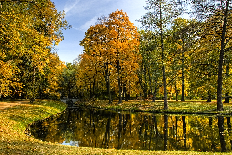 jesień w łazienkach królewskich